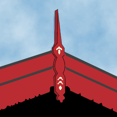 Décoration de pignon, pavillon du quartier Holmenkollen, Oslo.